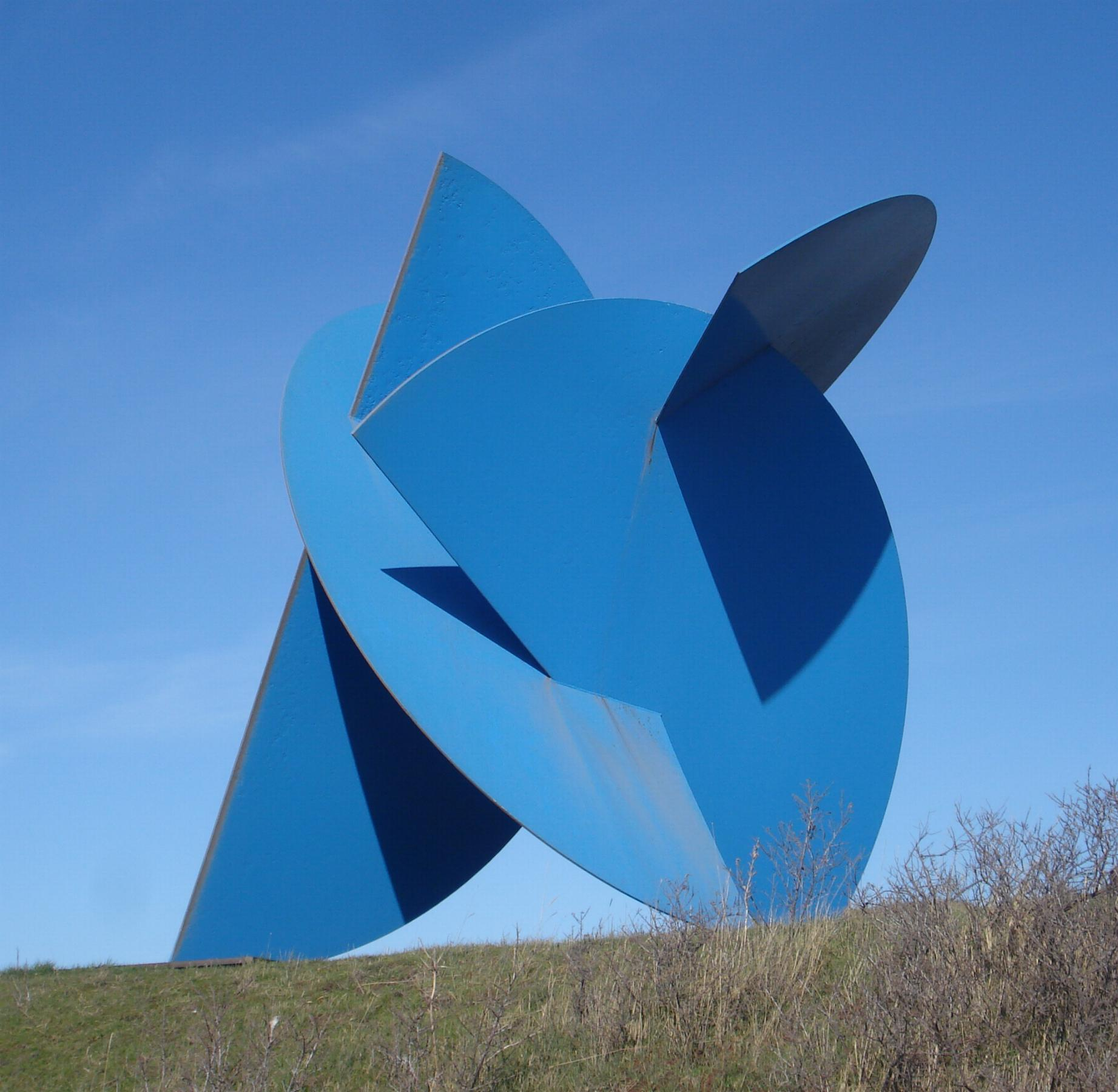 Wijk aan Zee, Zee van Staal. Kunstwerk "Playing waves" van Jaak Soans. The Netherlands. The photographical reproduction of this work is covered under the article 18 of the Dutch copyright law, which states that “it is not an infringement of copyright to reproduce and publish pictures of a work, as meant in article 10, first paragraph, under 6°[1] or of an architectural work as meant in article 10, first paragraph, under 8°[2], which are made to be permanently located in a public place, as long as the work is depicted as it is located in the public space. Where incorporation of a work in a compilation is concerned, not more than a few of the works of the same author may be included”. [1] drawings, paintings, works of architecture and sculpture, lithographs, engravings and the likes [2] drafts, sketches and three-dimensional works relating to architecture, geography, topography or other sciences Note that photographs are not included in Item 6. They are separately listed at Item 9 and are therefore not covered by FOP. See COM:CRT/Netherlands#Freedom of panorama for more information. .